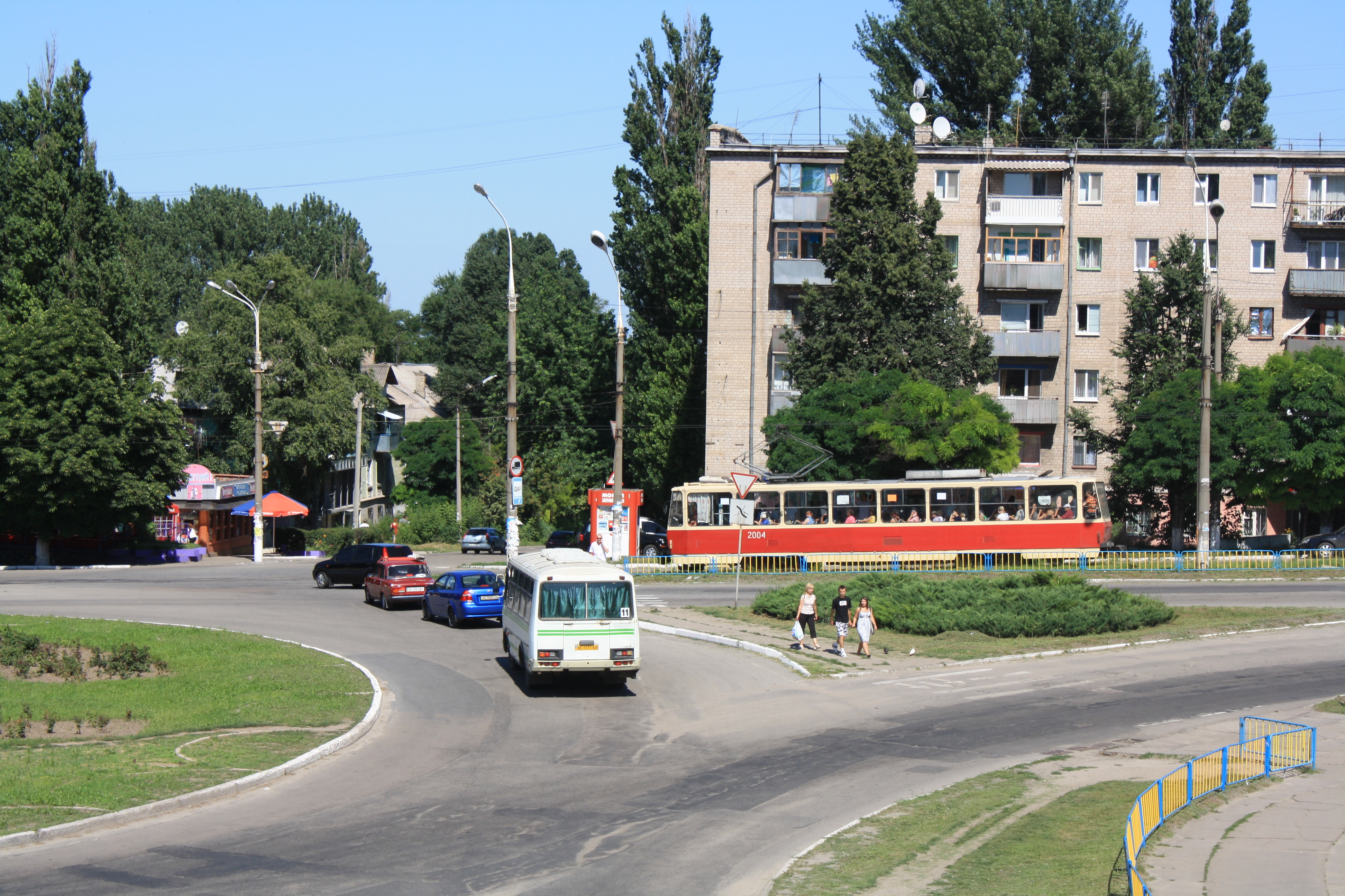 Транспортне перехрестя біля Аврори, Дніпродзержинськ